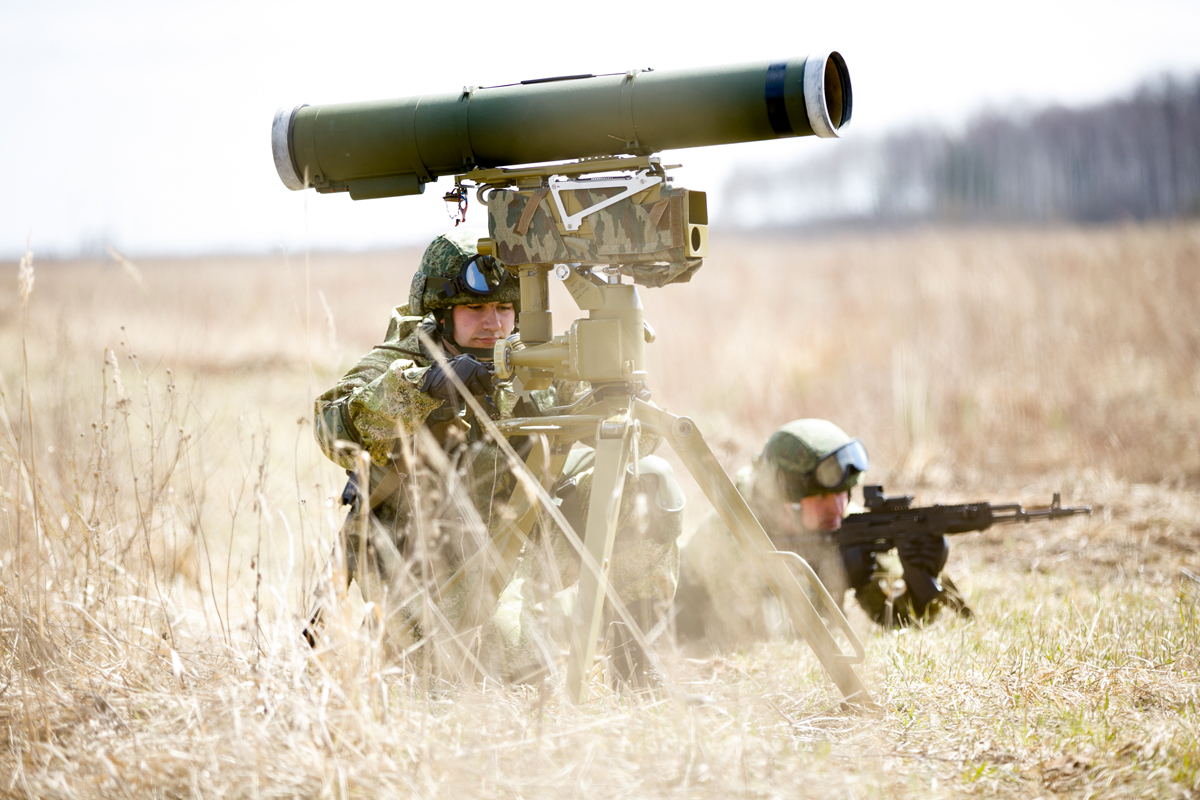 Контрольная проверка курсантов Учебного центра боевого применения ракетных войск и артиллерии Сухопутных войск Западного военного округа (Московская обл.)